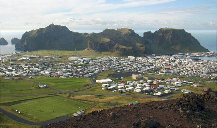 Blick auf Heimaey, Island